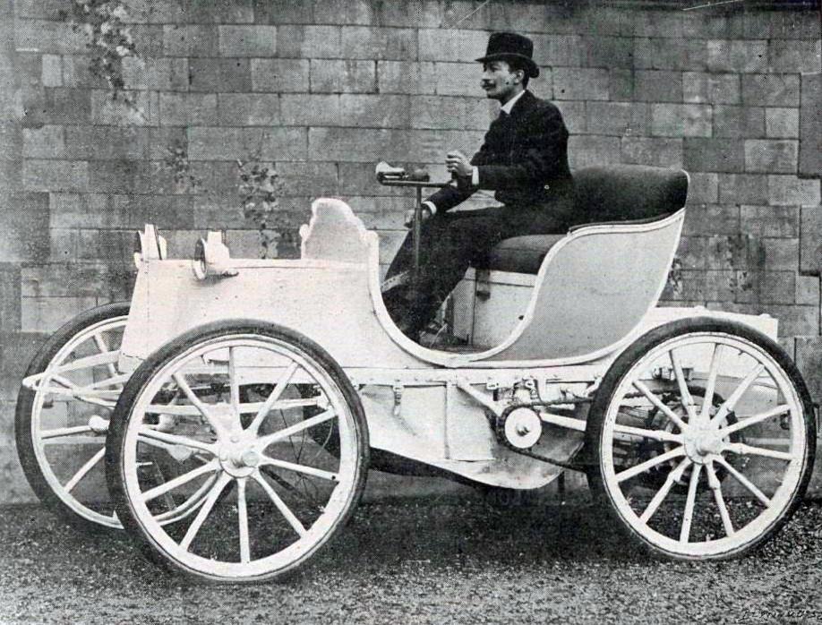 Le Comte Gaston de Chasseloup-Laubat, sur Jeantaud Duc électrique en 1899.